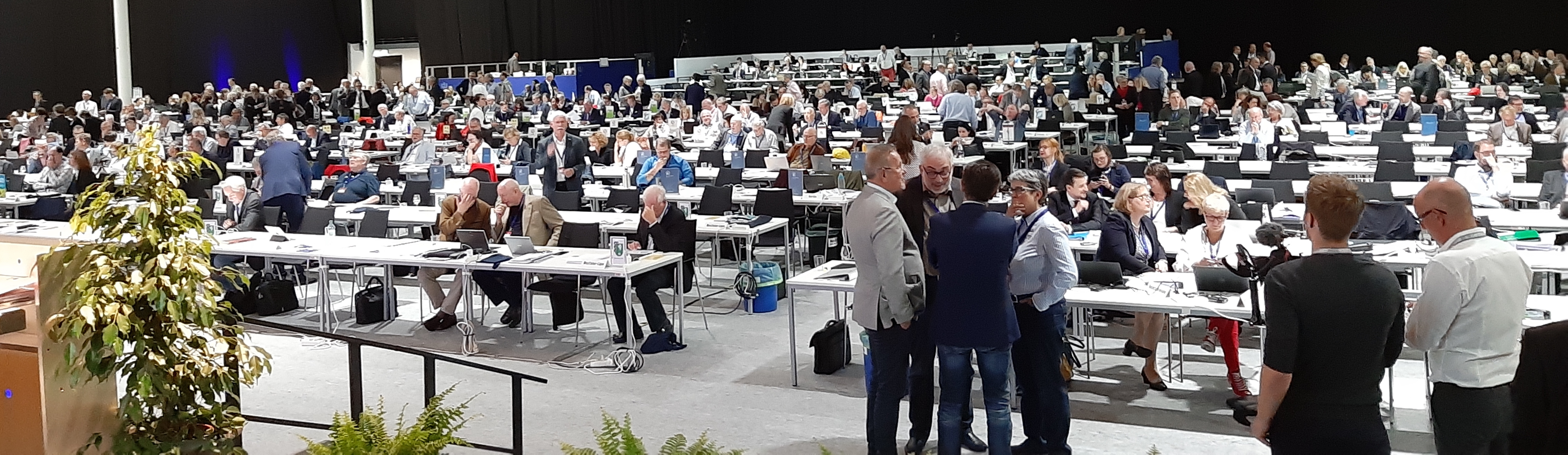 Deutscher Ärztetag (2019)